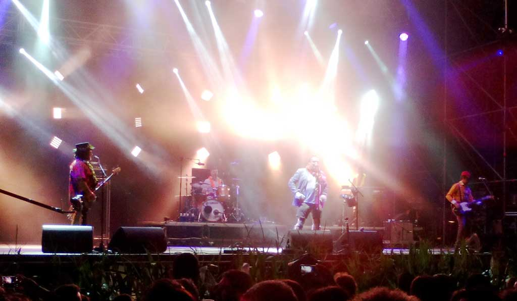 Concerto de Los Toreros Muertos no Festival de la Luz de Boimorto, A Coruña.